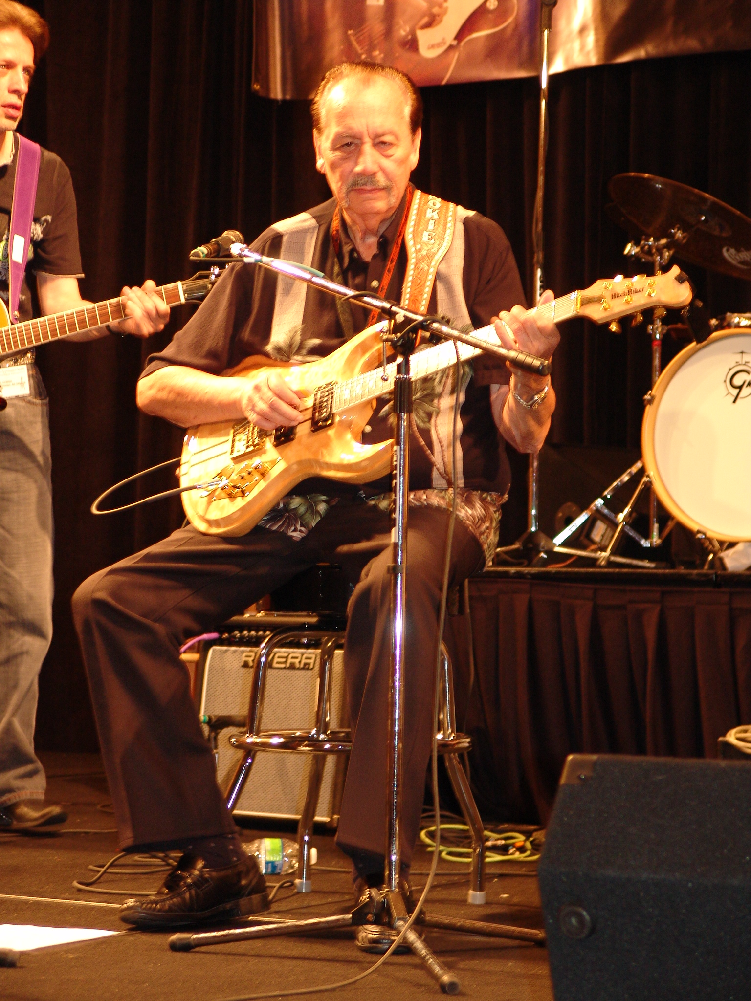 Photographie prise à NASHVILLE lors du "Chet AtkinsAppreciation Society" de 2009